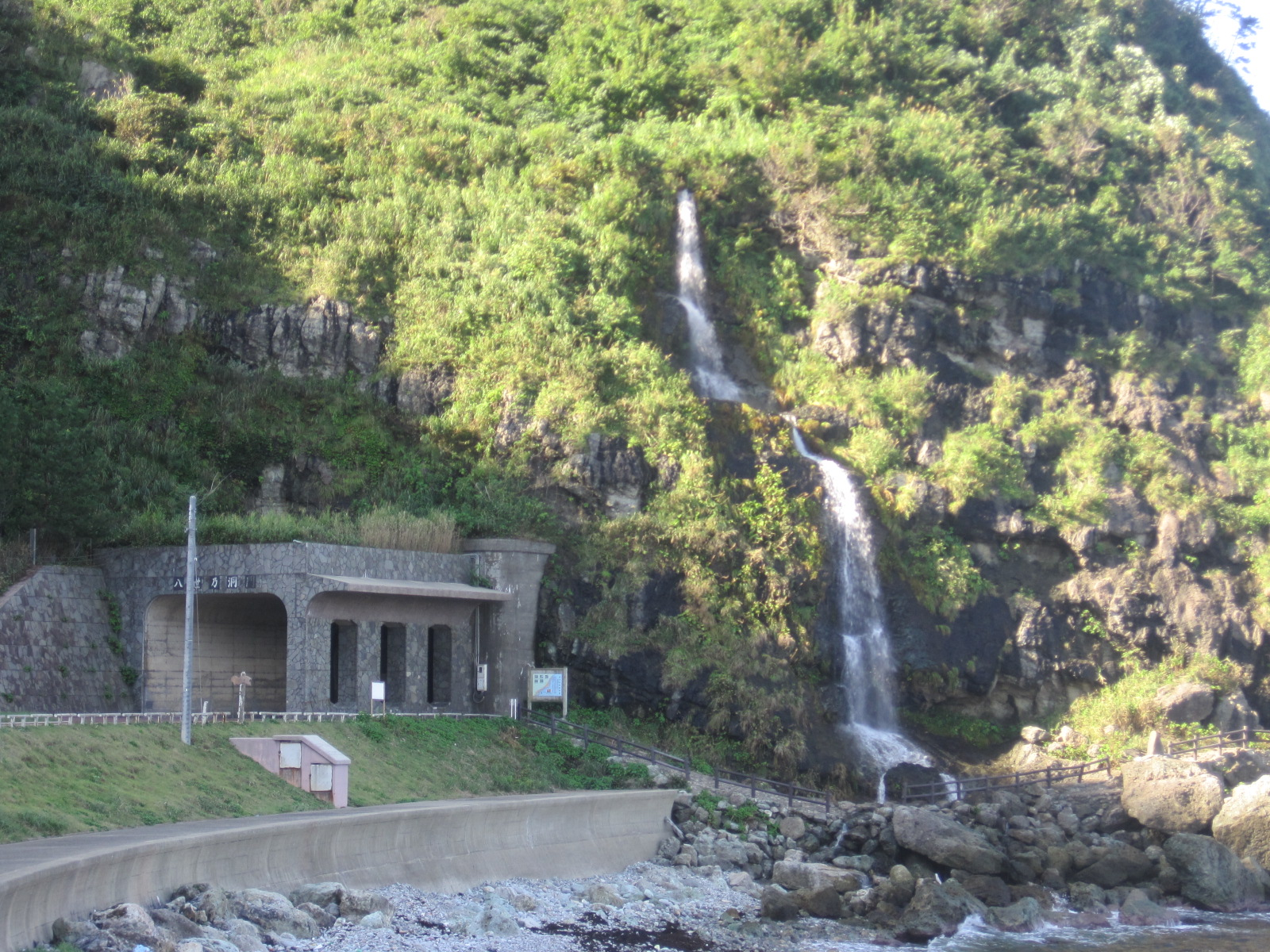 石川県輪島市の曽々木海岸にある八世乃洞門と垂水の滝。垂水の滝は冬季には海岸からの風で吹き上げられる光景が有名。八世乃洞門は2007年の能登半島地震で通行不能になり、現在は新しいトンネルが出来ている。